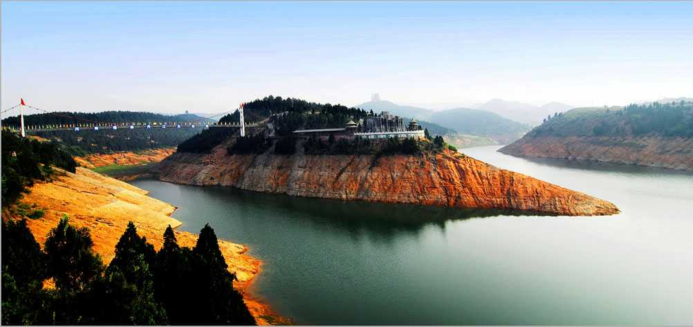 henanfengjing